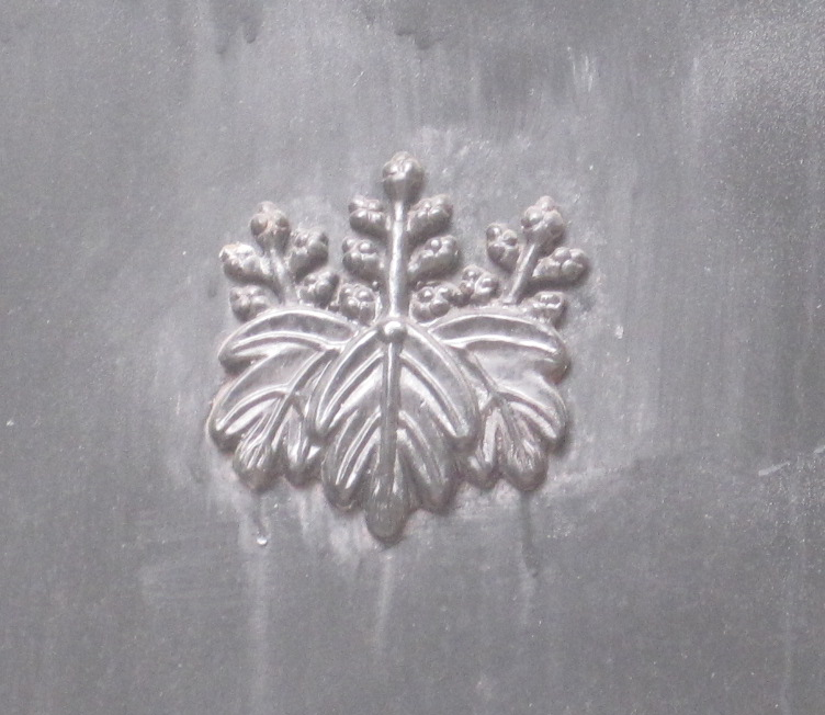 三義建中國小奉安殿桐紋裝飾